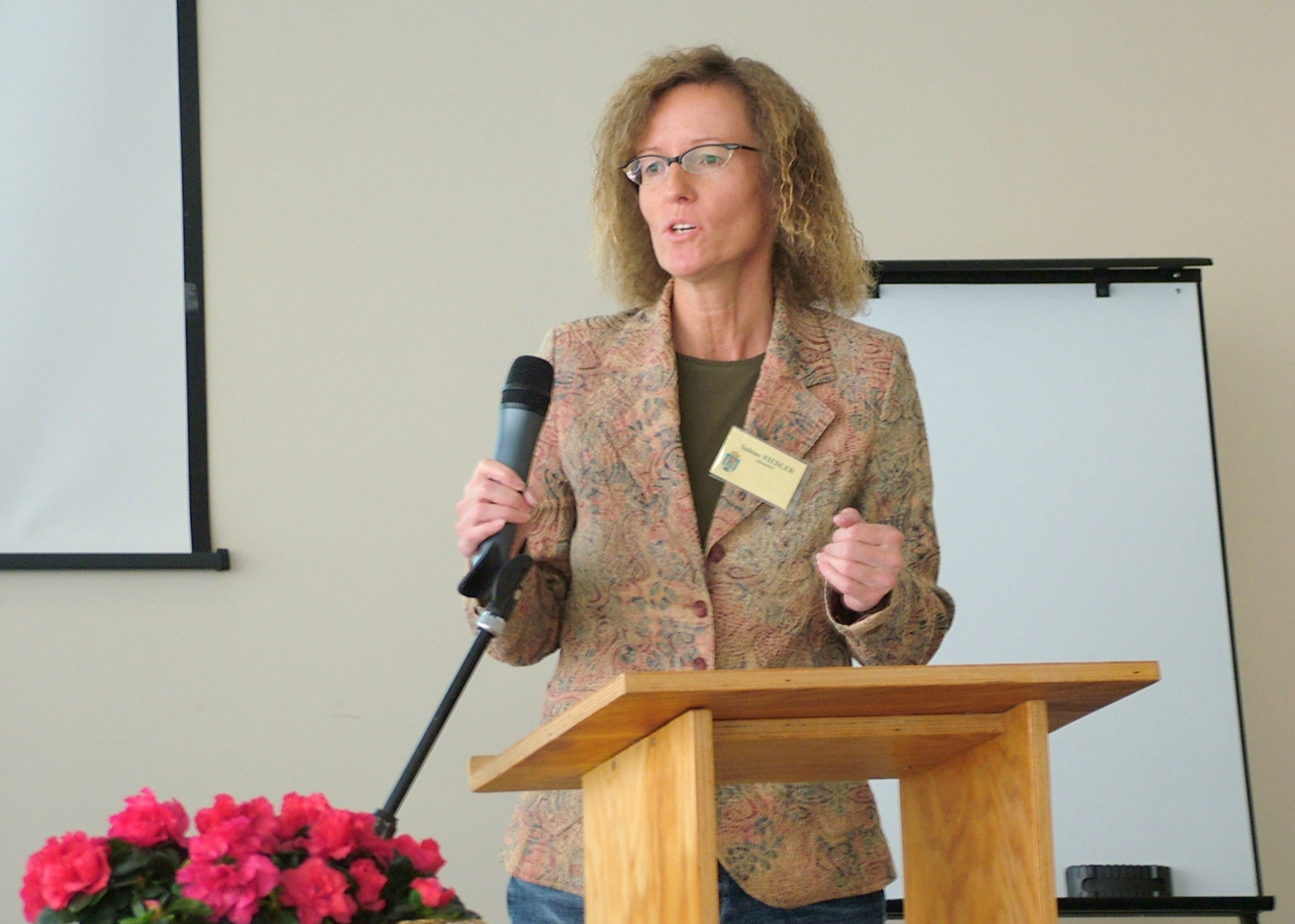 Sabine Fiedler, UAM Poznan